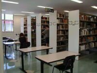 Qaraqalpaqsha: Acervo da Biblioteca Florestan Fernandes